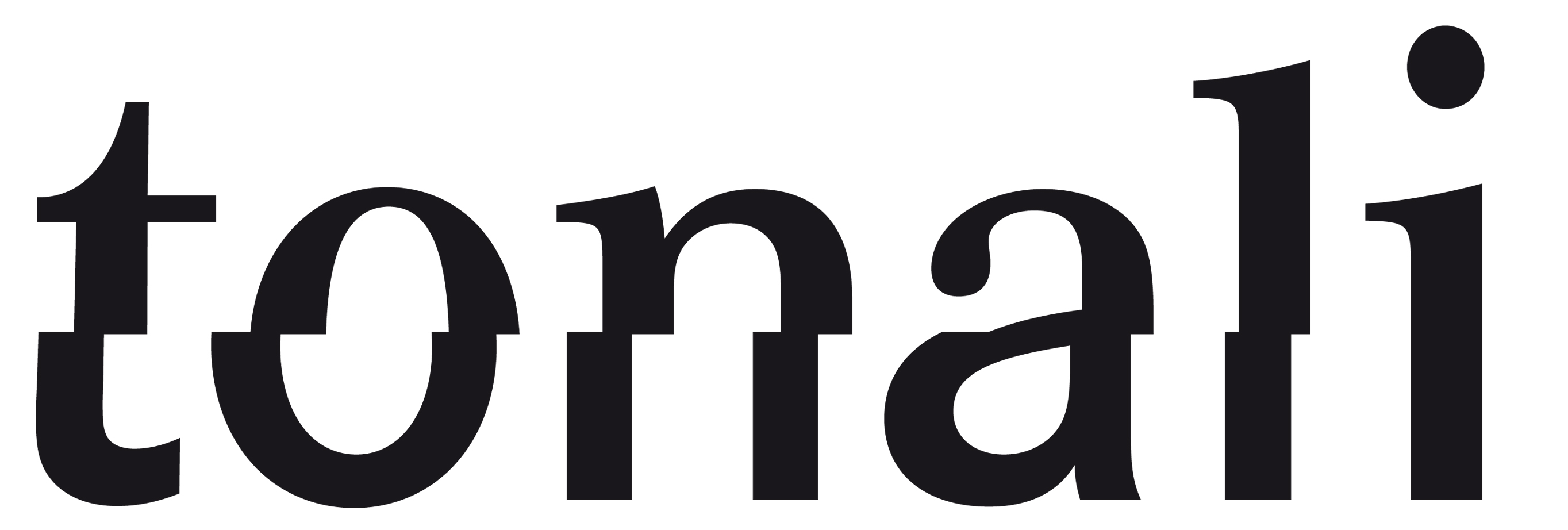 Offizielles Logo des TONALi Grand Prix